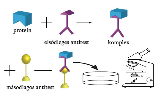 IF